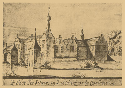 't Slot Ter Scheer, Salland nabij Coevorden